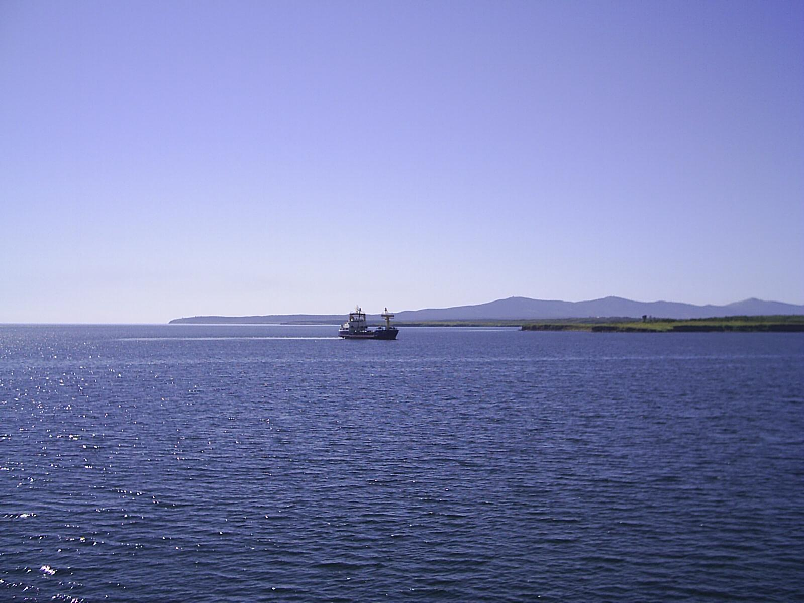 Снимок 2006 г. Сделан с борта парома